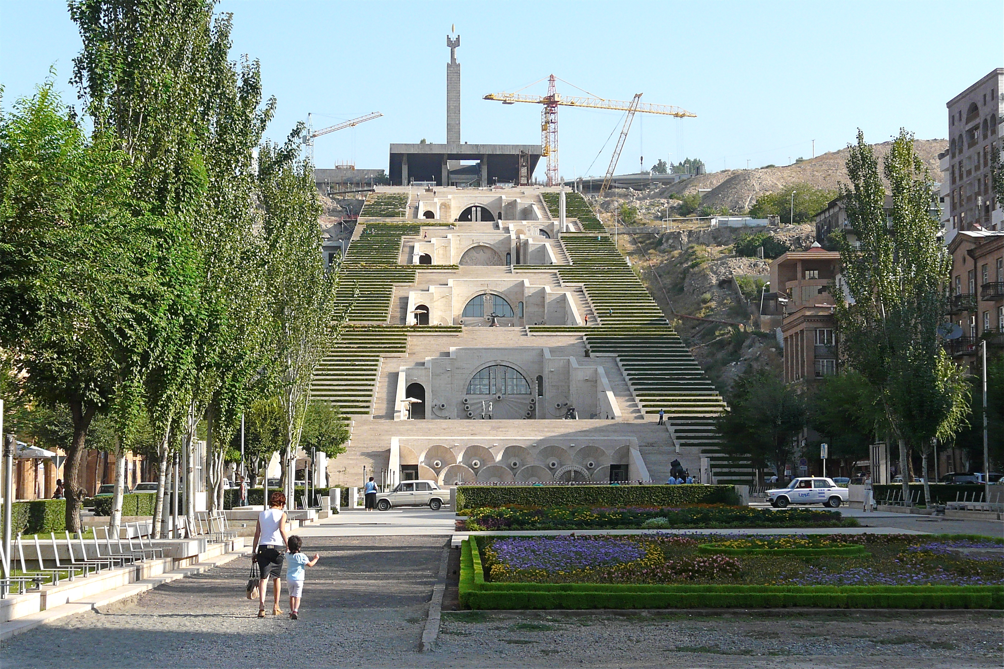 Het bloemenpark vlak voor de 'Cascades' in het centrum van Yerevan. Zicht vanuit het park.